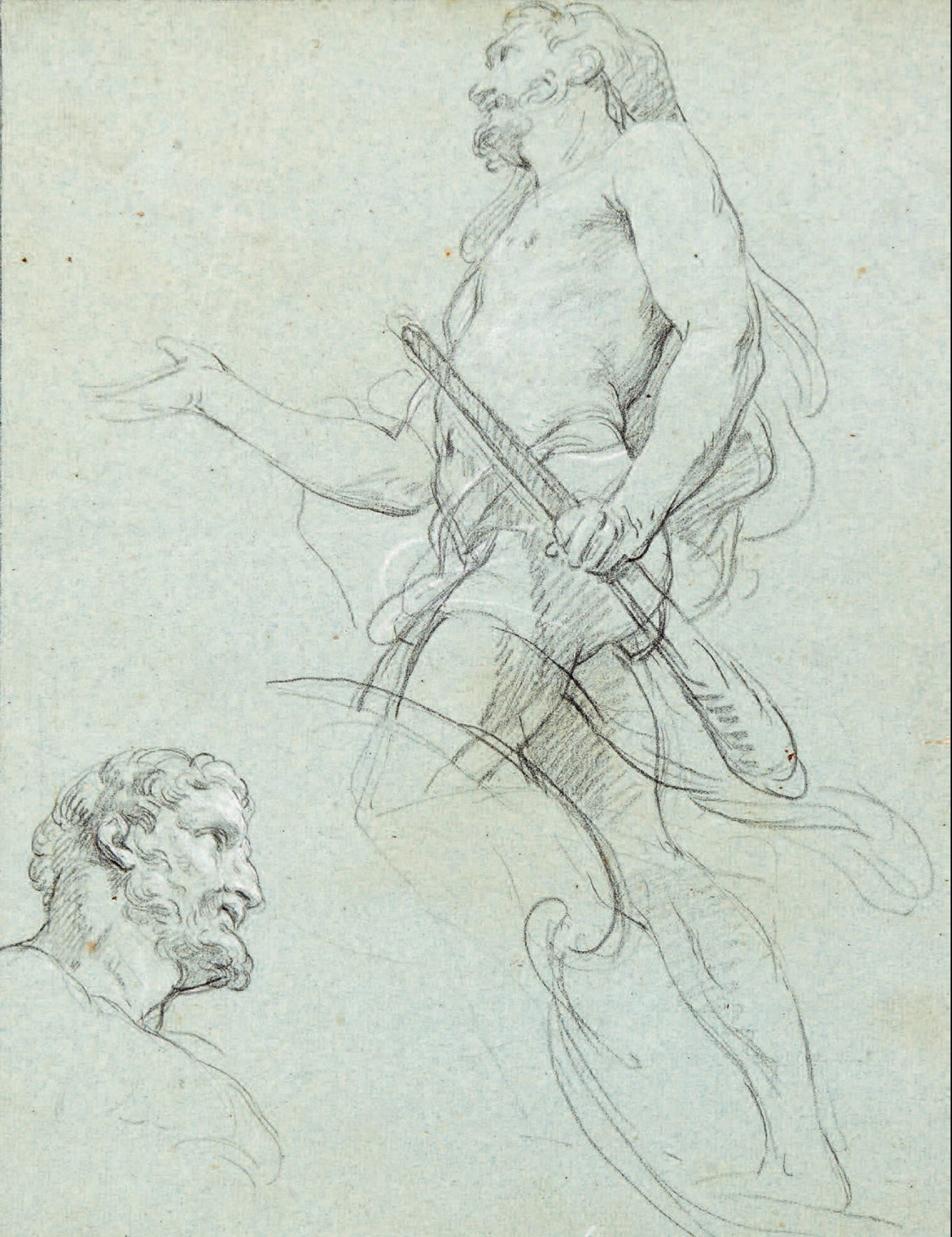 Pierre noire, craie blanche - 31,5 x 24 cm Préempté par le château de Versailles Photo : Beaussant-Lefèvre